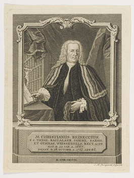 Bildnis des Orientalisten Christian Reineccius